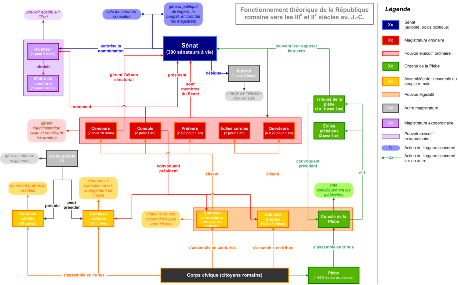 Organigramme réalisé sous Microsoft Visio décrivant le fonctionnement théorique des institutions de la République romaine.